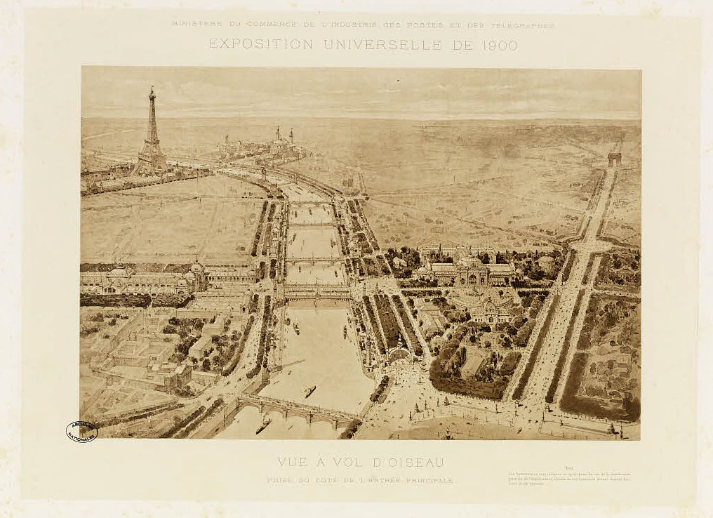 Exposition universelle de Paris de 1900. Gravure représentant, sous forme d'une vue à vol d’oiseau, le Grand Palais, le Petit Palais et les pavillons de l'esplanade des Invalides, des quais de la Seine, du Champ de Mars et du Trocadéro.